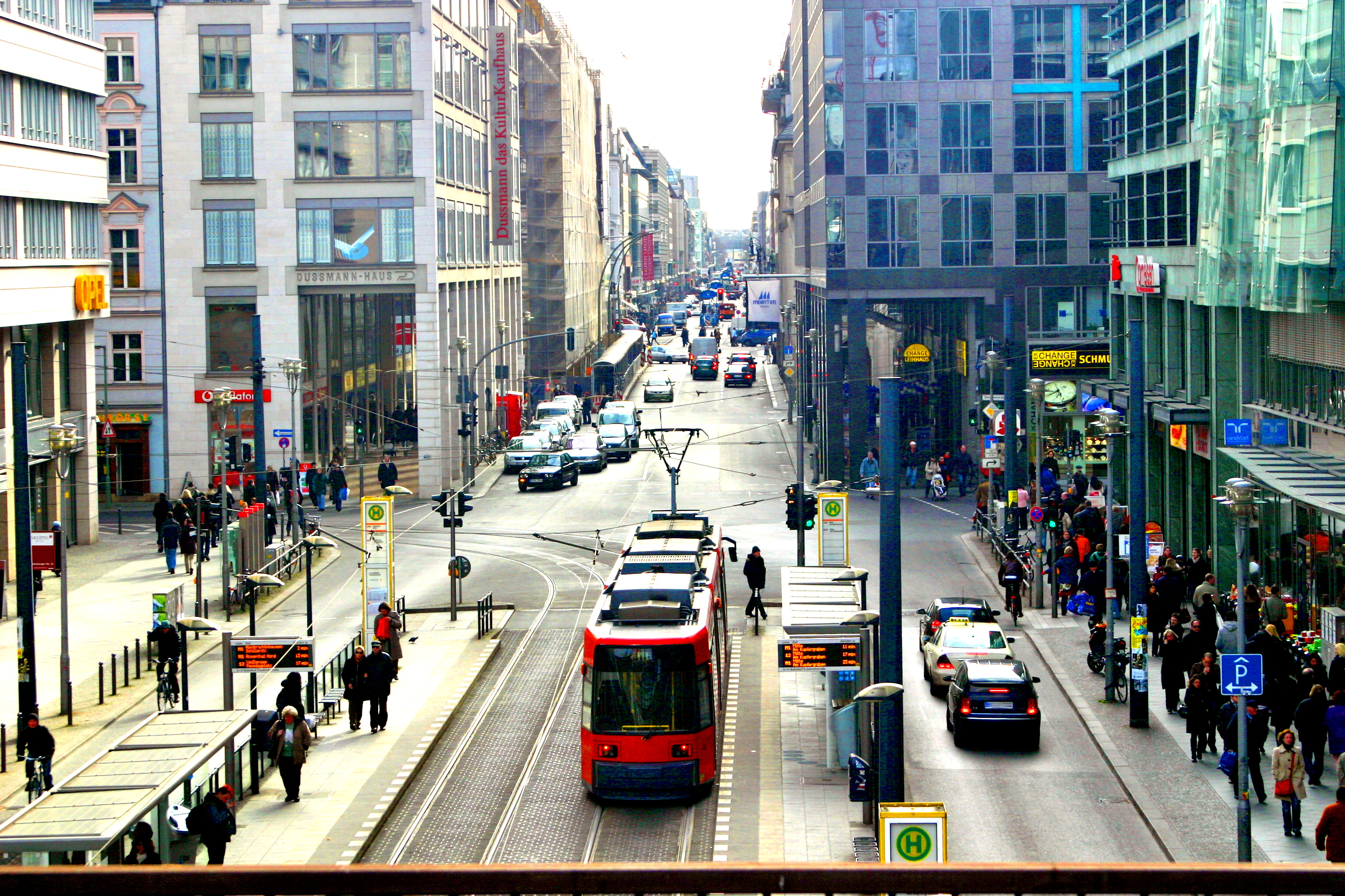 Friedrichstrasse in Berlin